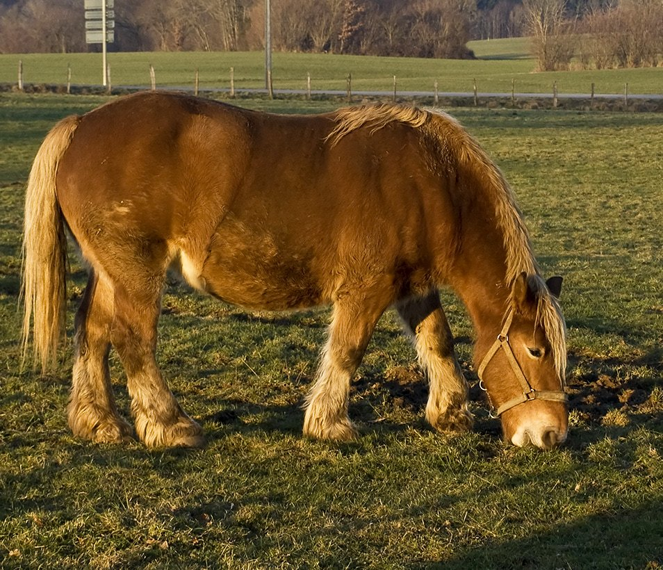 Comtois